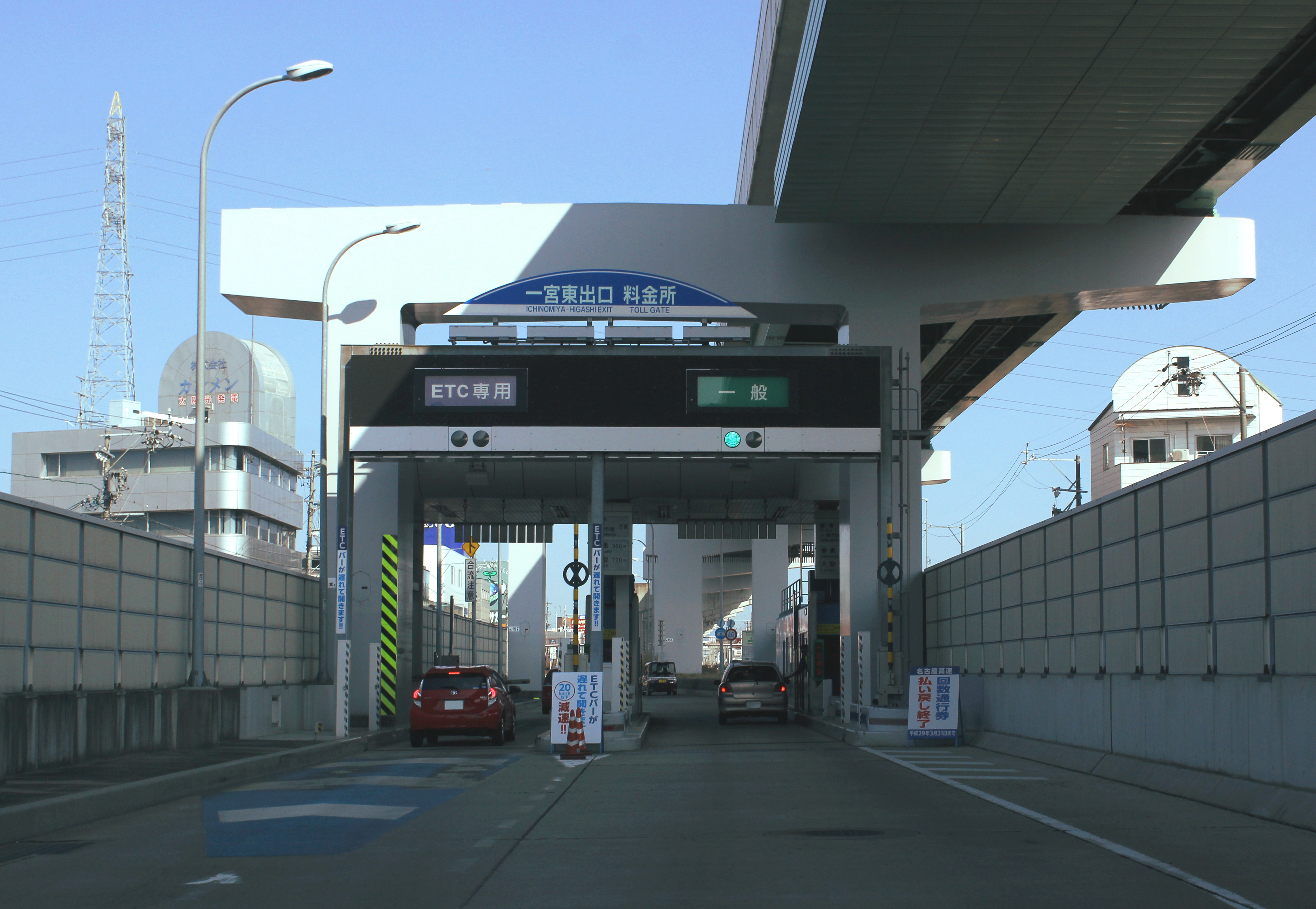 名古屋高速 一宮東出口料金所